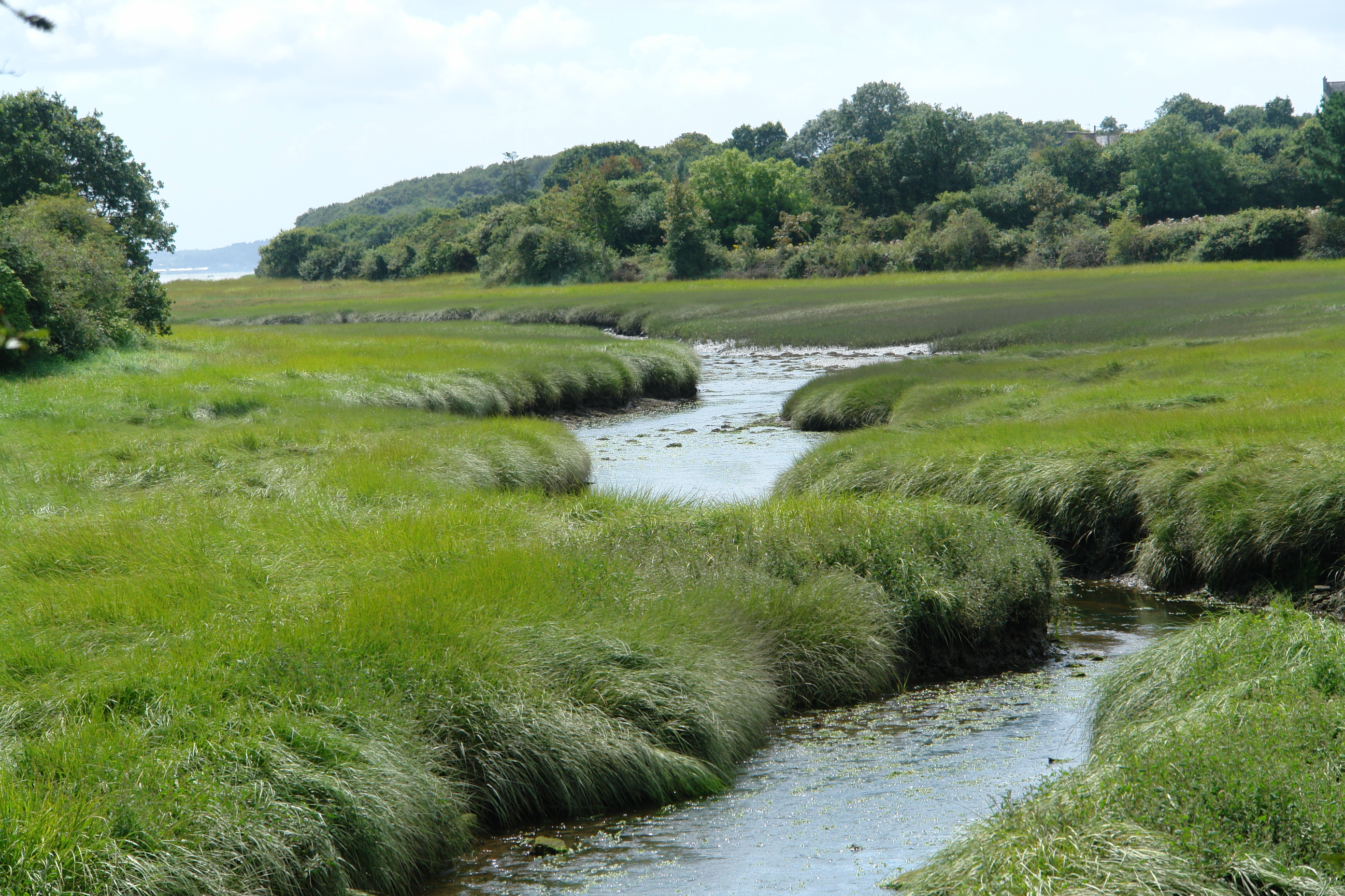 Ruisseau du Glanves à Penfoul, à l'endroit où il se jette dans la mer. (Finistère, Bretagne).